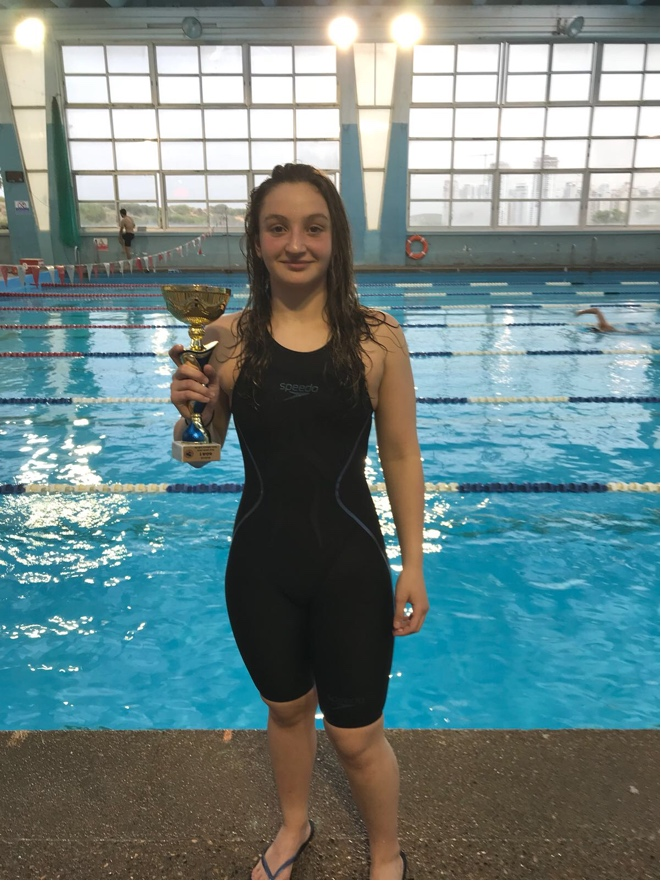 מצטיינת גיל 14 וינגייט